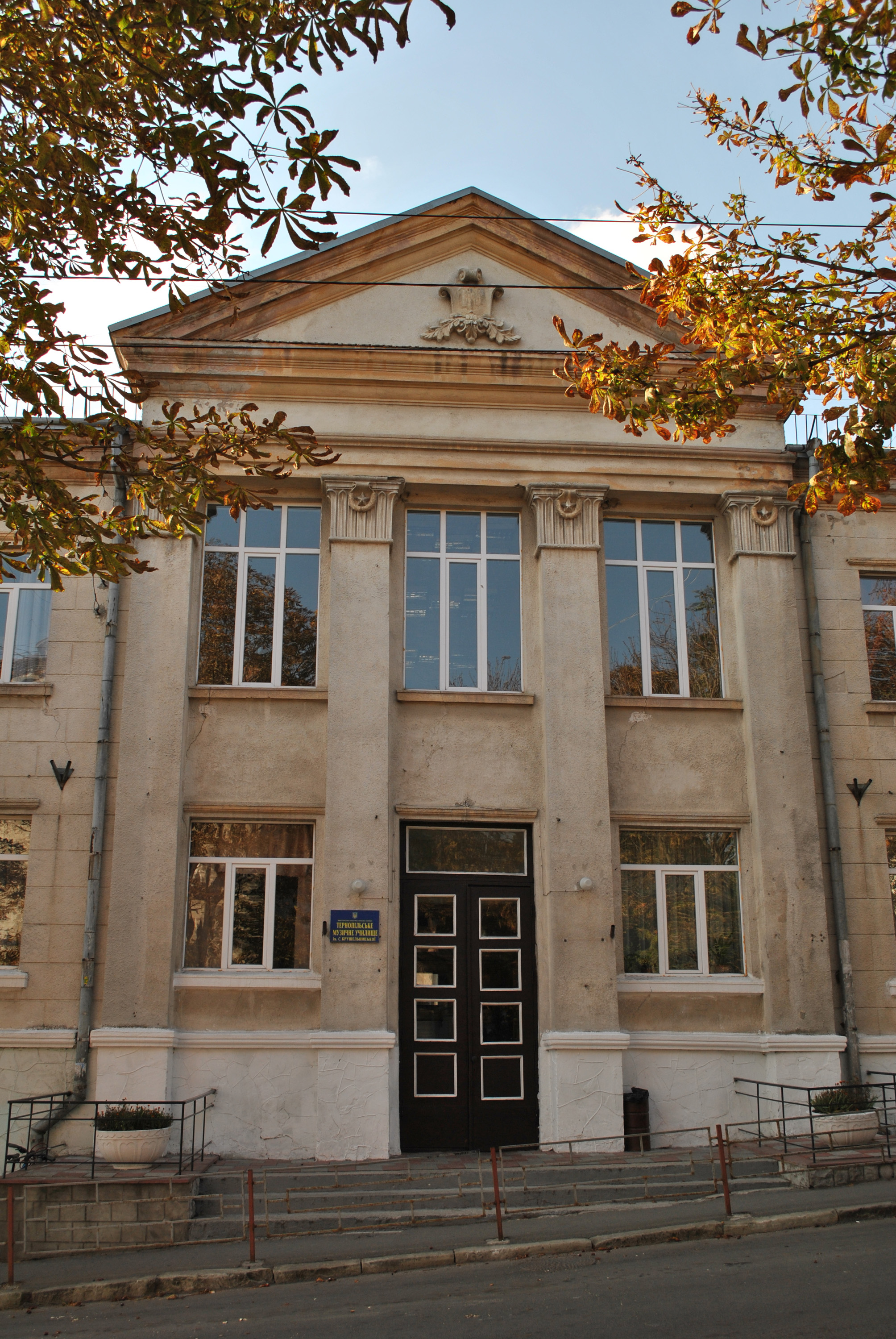 Будівля музичного училища (мур.) на вул. Паращука, 4 в Тернополі.